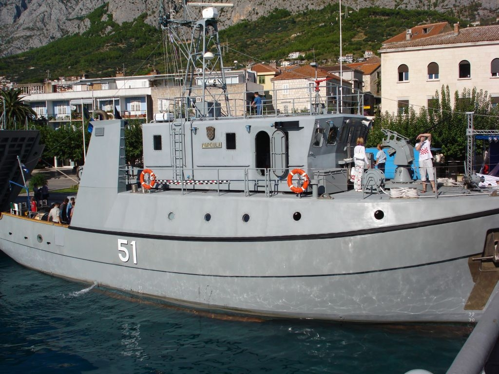 LM-51 Korčula